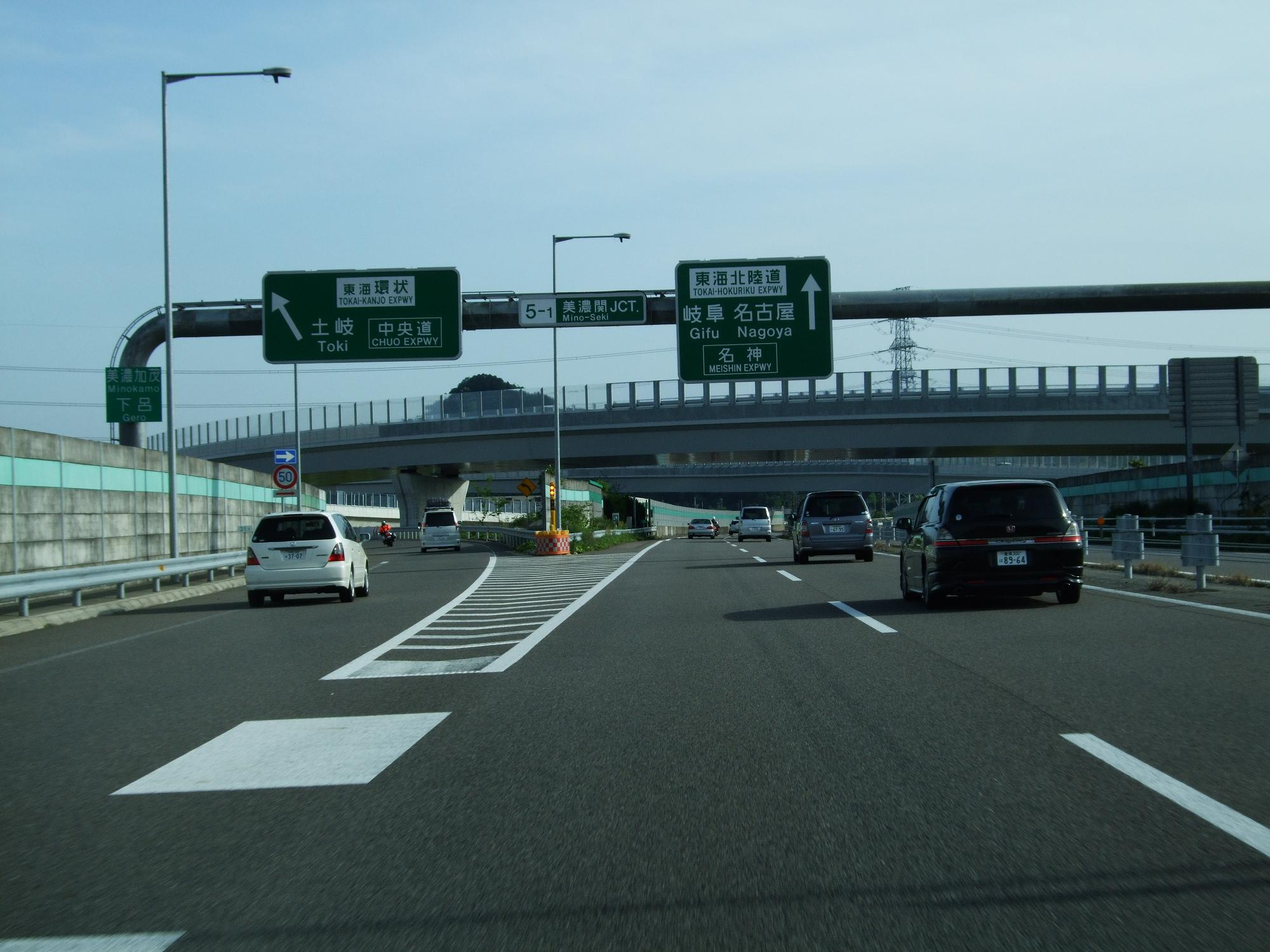 東海北陸自動車道 美濃関ジャンクション付近（上り方面） 2008.5.4 投稿者が撮影